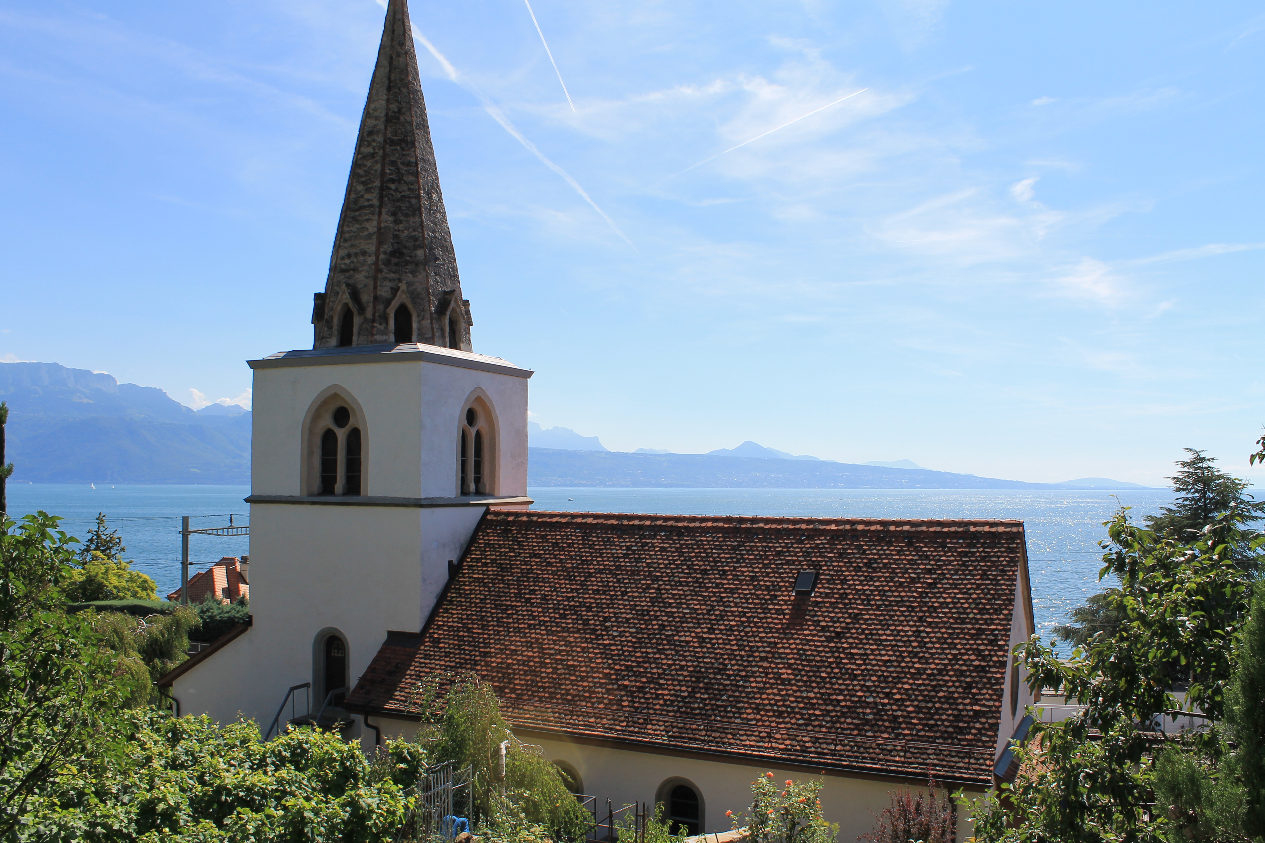 Terrasses de Lavaux